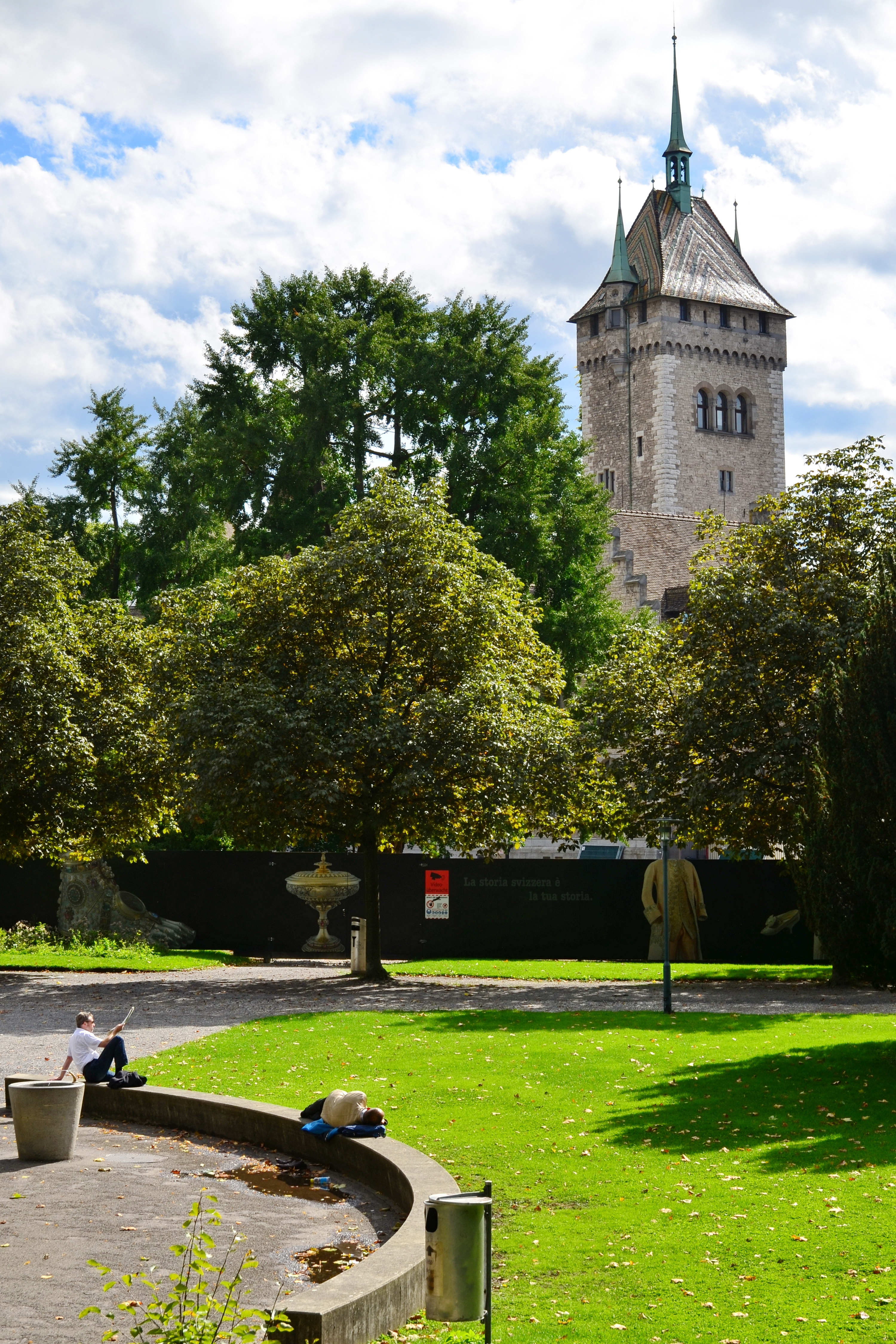 Platzspitz